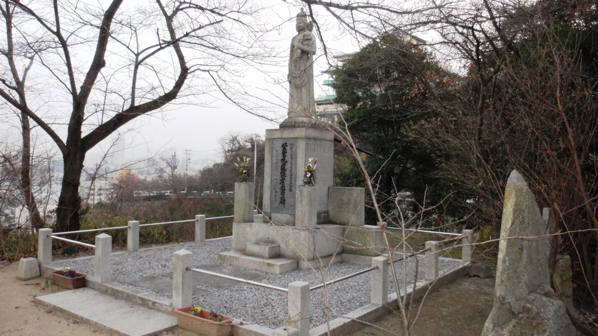 紫雲丸事故の遭難者慰霊碑。香川県高松市西宝町三丁目の西方寺境内にある。瀬戸内海を見下ろすように建っており、背景にも高松市中心部が見える。